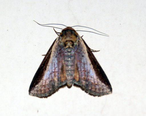 Lophoptera squammigera